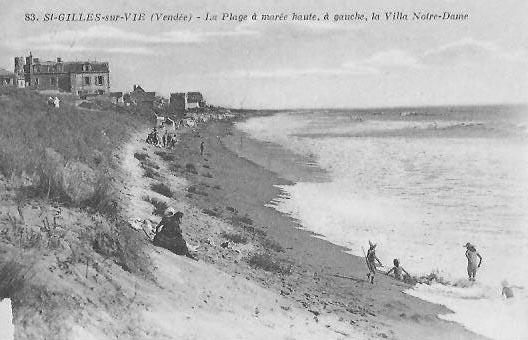 Saint-Gilles-sur-Vie dans le département de la Vendée (France) : La plage à marée haute, à gauche la Villa Notre Dame, carte postale postée en 1921 ou 1922.